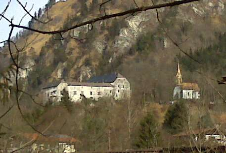 Burg Marquartstein in Bayern